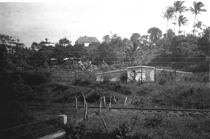 Foto. Krankzinnigengesticht Soember Porong 23 juni 1902 - 23 juni 1922. Het water-reservoir van Soember porrong Het water reservoir met op de voorgrond een spoor van Soember Porrong